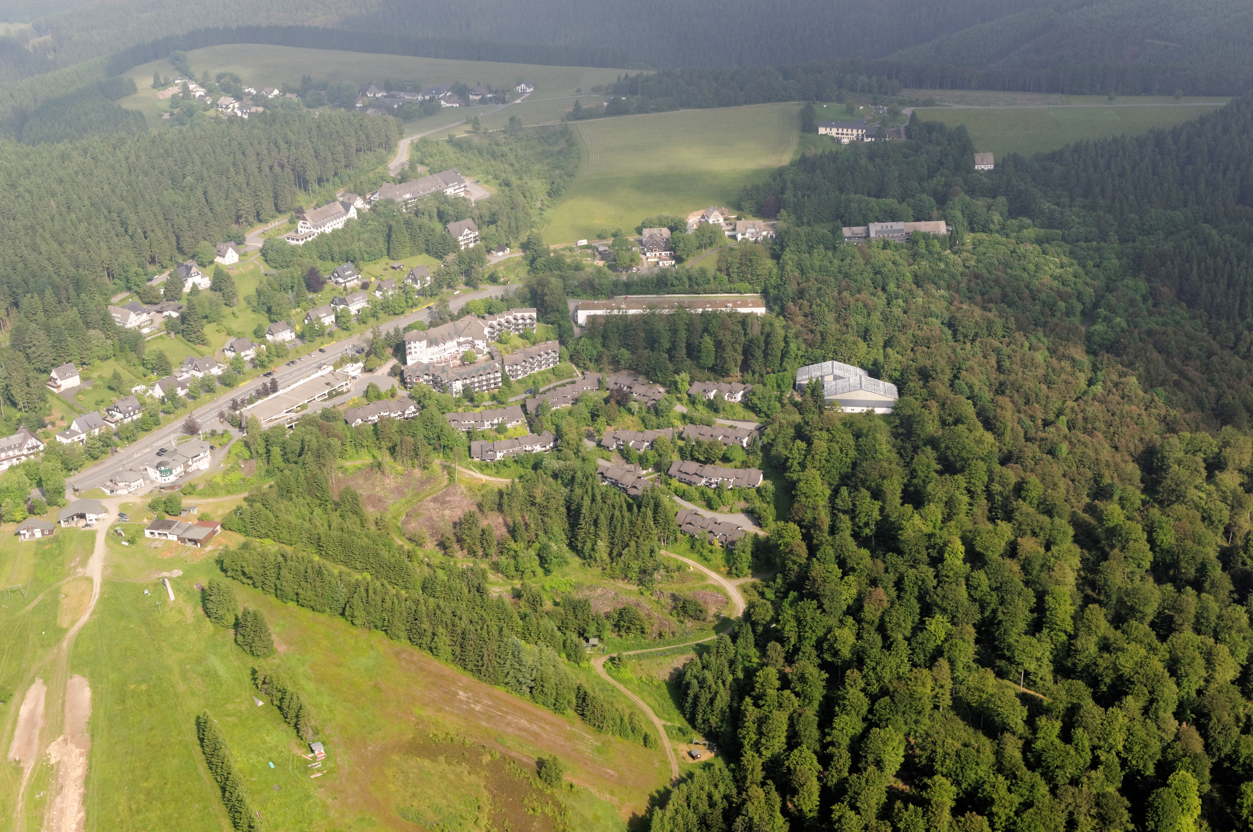 Fotoflug Sauerland-Ost, Winterberg-Neuastenberg, Postwiesen-Skigebiet, Jugendherberge Astenberg